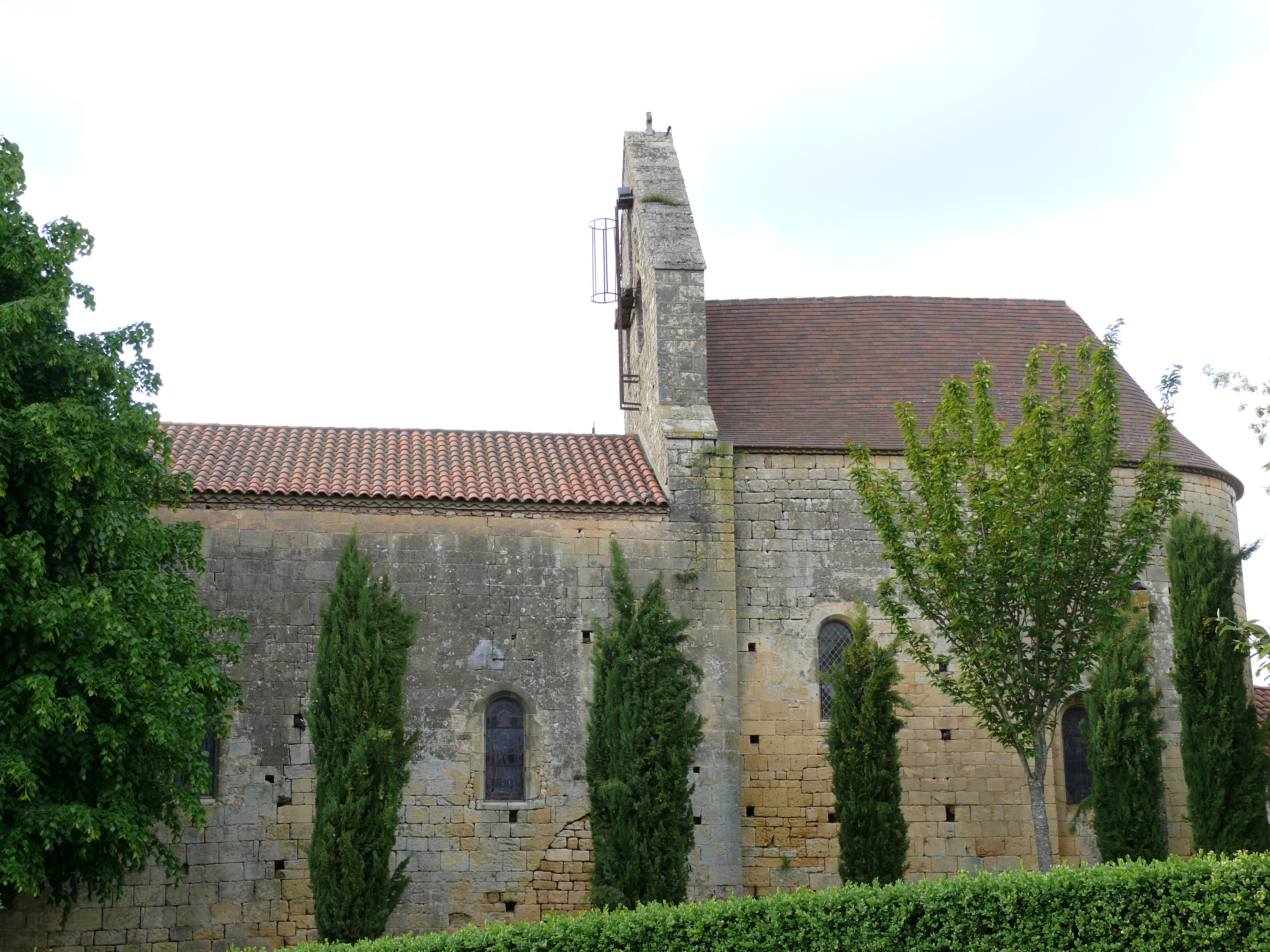 Salles-de-Belvès - Eglise Saint-Sacerdos